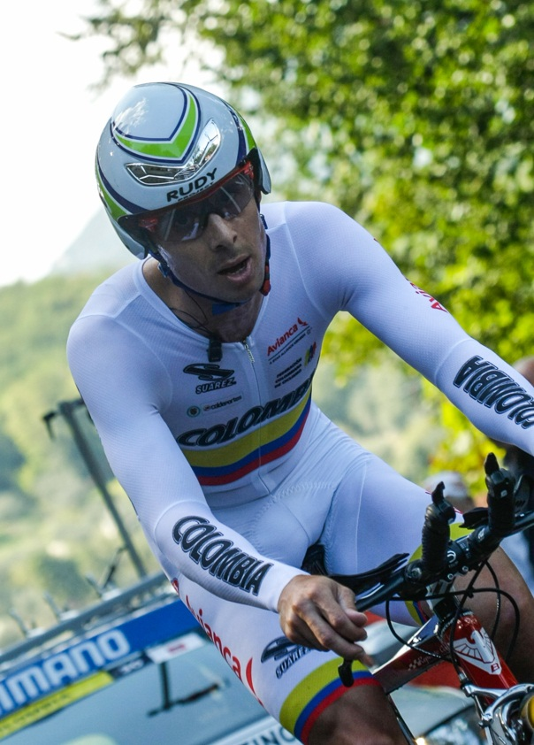 Rafael Infantino en en el Campeonato Mundial de Ciclismo en Ruta 2013.